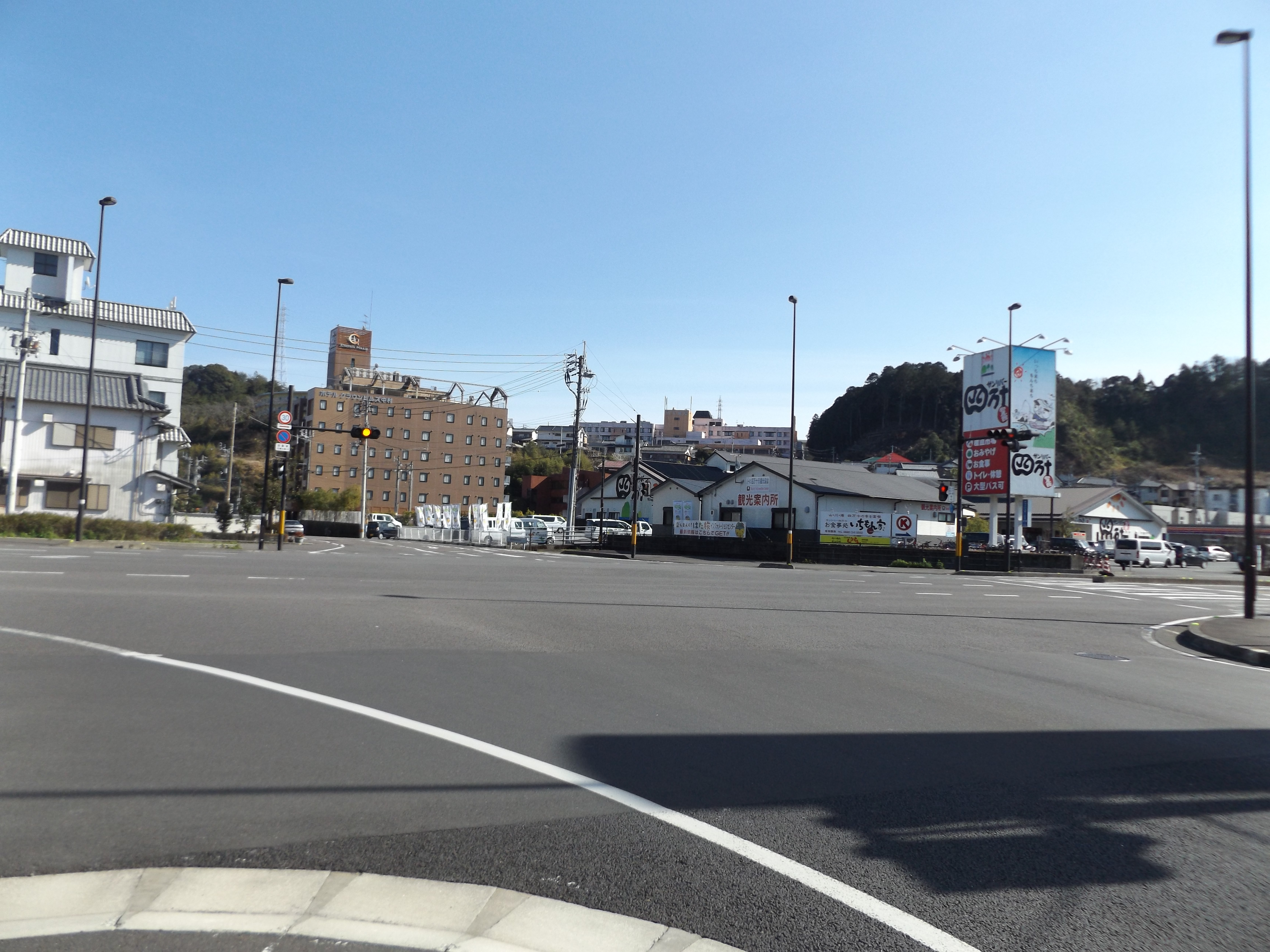 高知県四万十市にある国道56号と国道439号の交差点。国道439号はここが終点である。